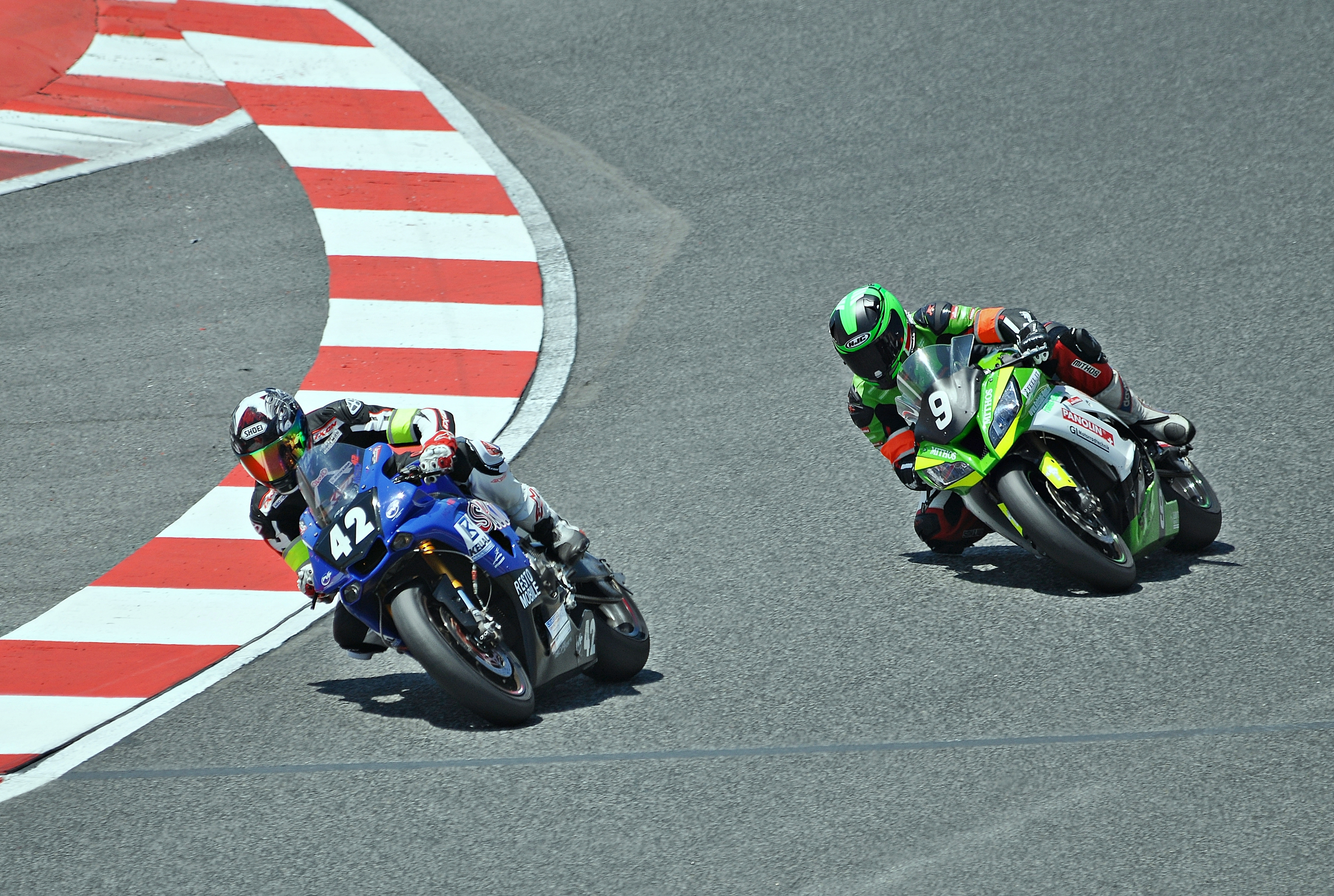 Circuito de Barcelona